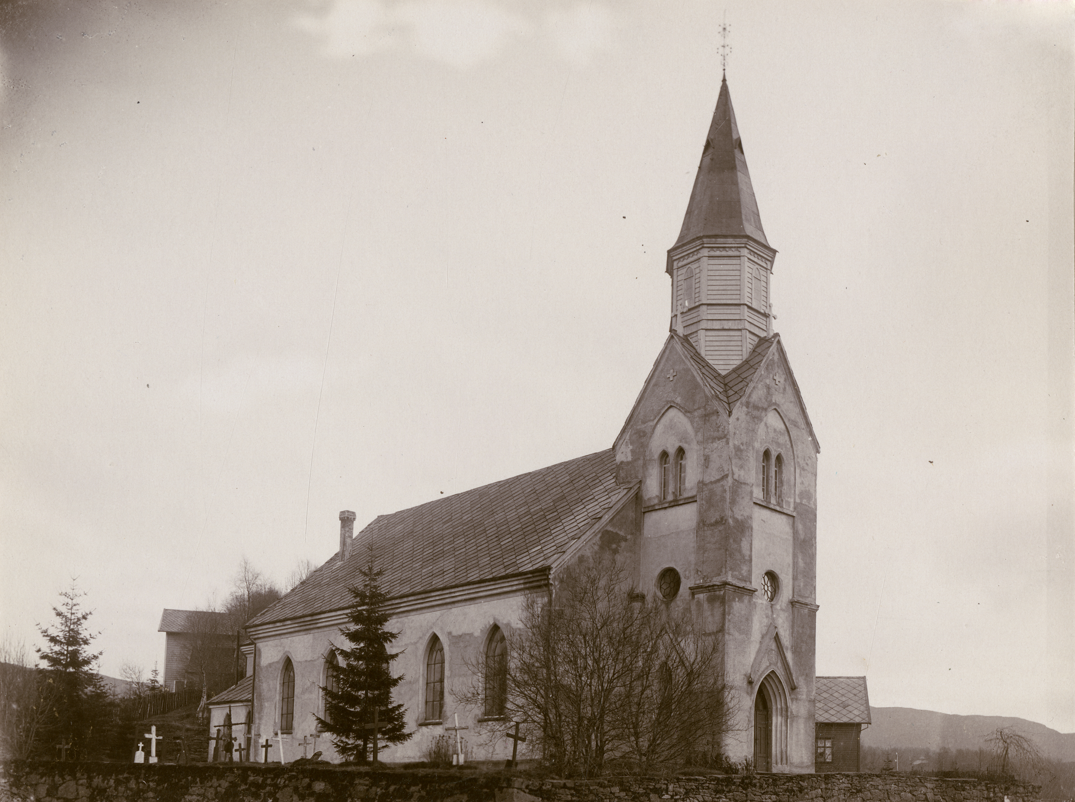 Birkeland kirke i Bergen, Hordaland